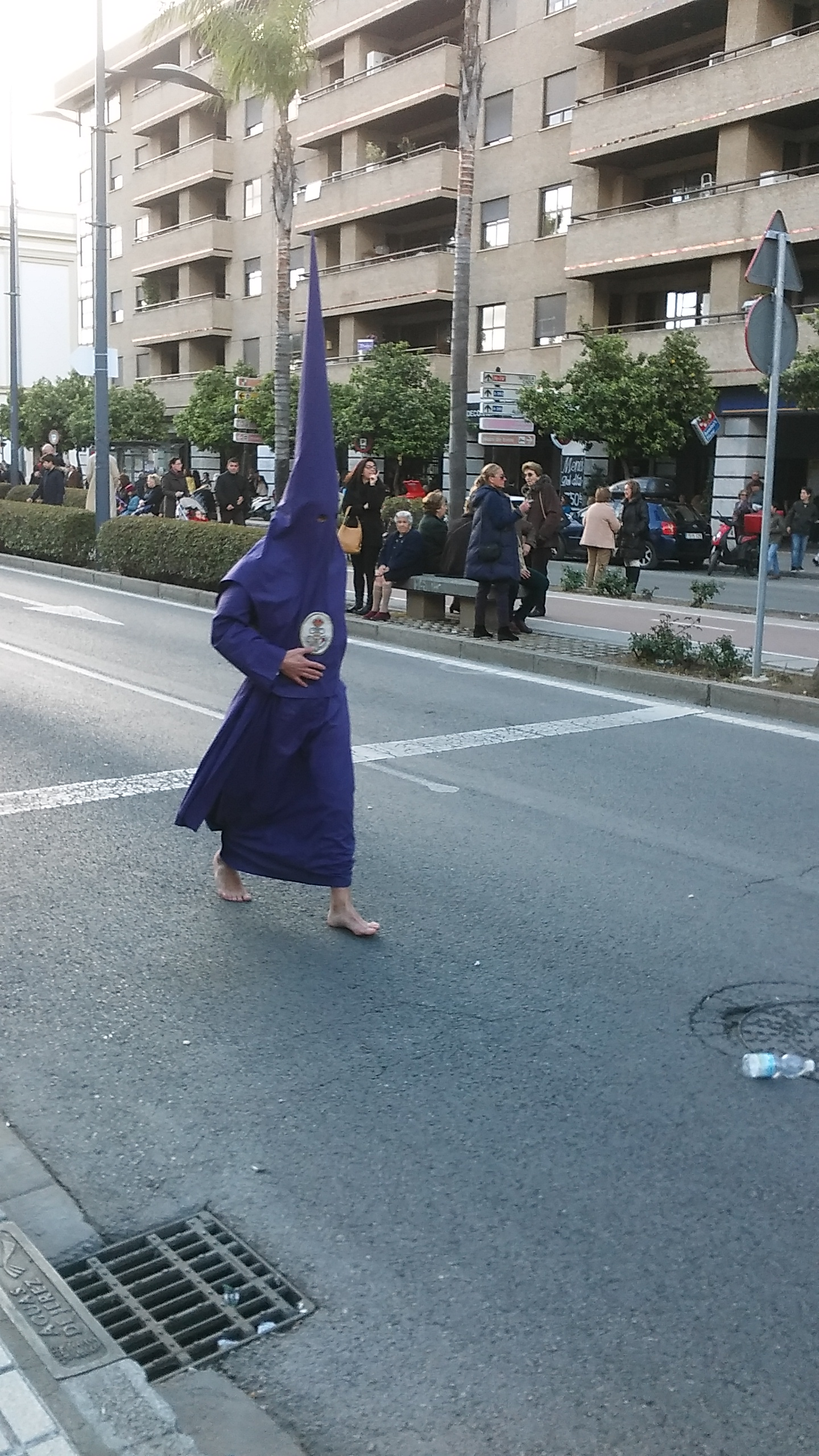 Penitente La Defensión Jerez